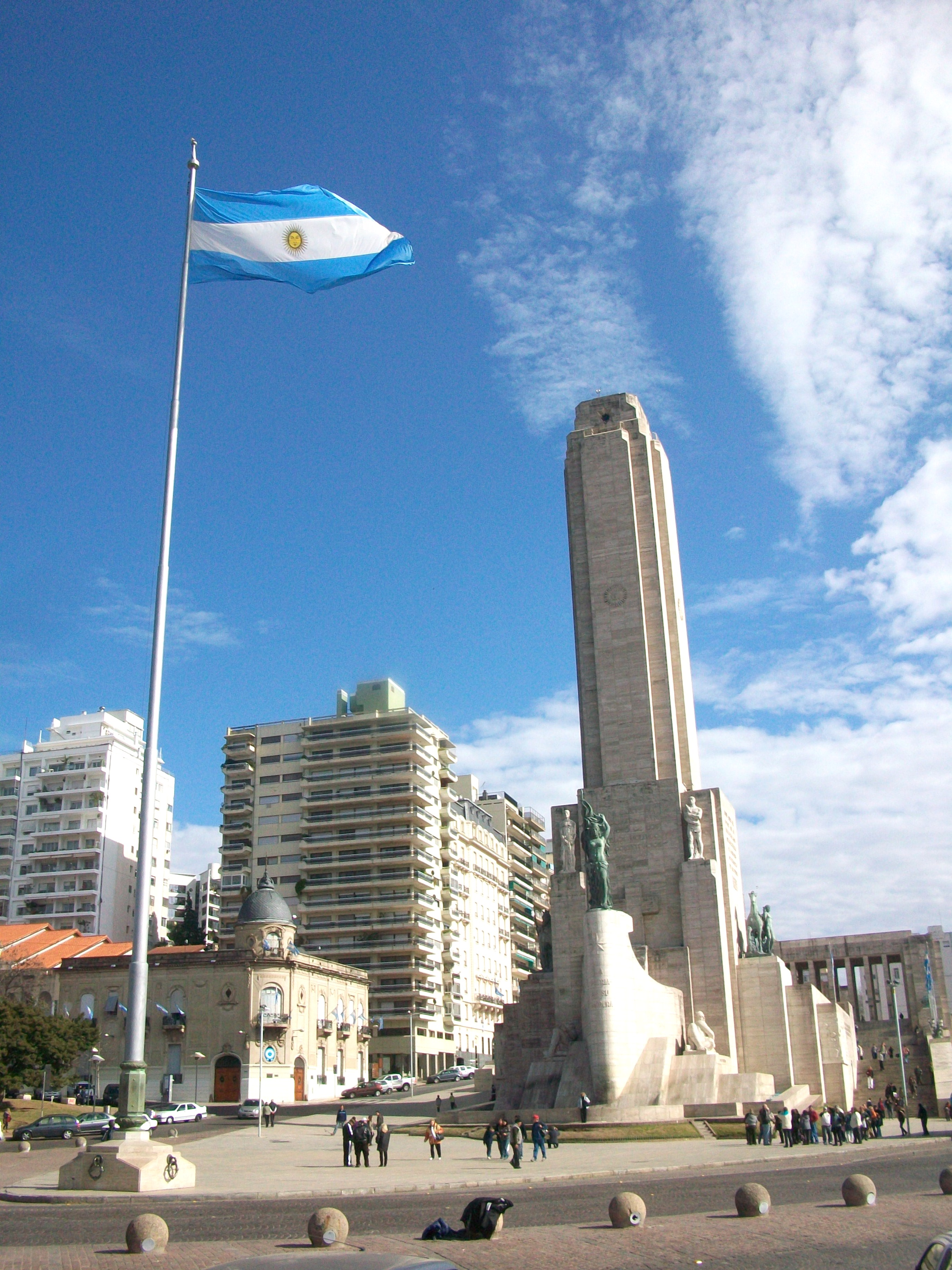 Monumento Nacional a la Bandera